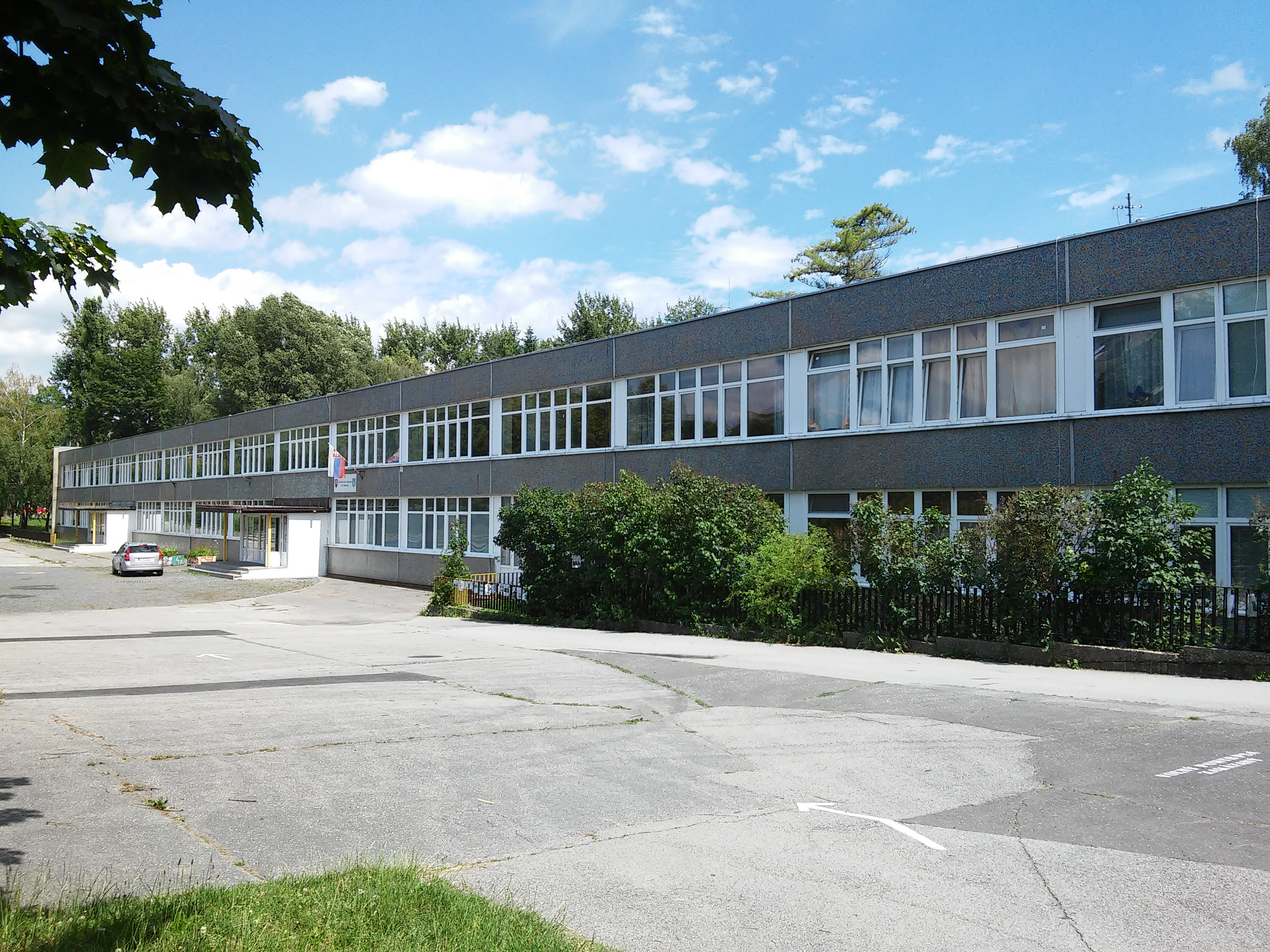 Beňovského, Dúbravka, Bratislava